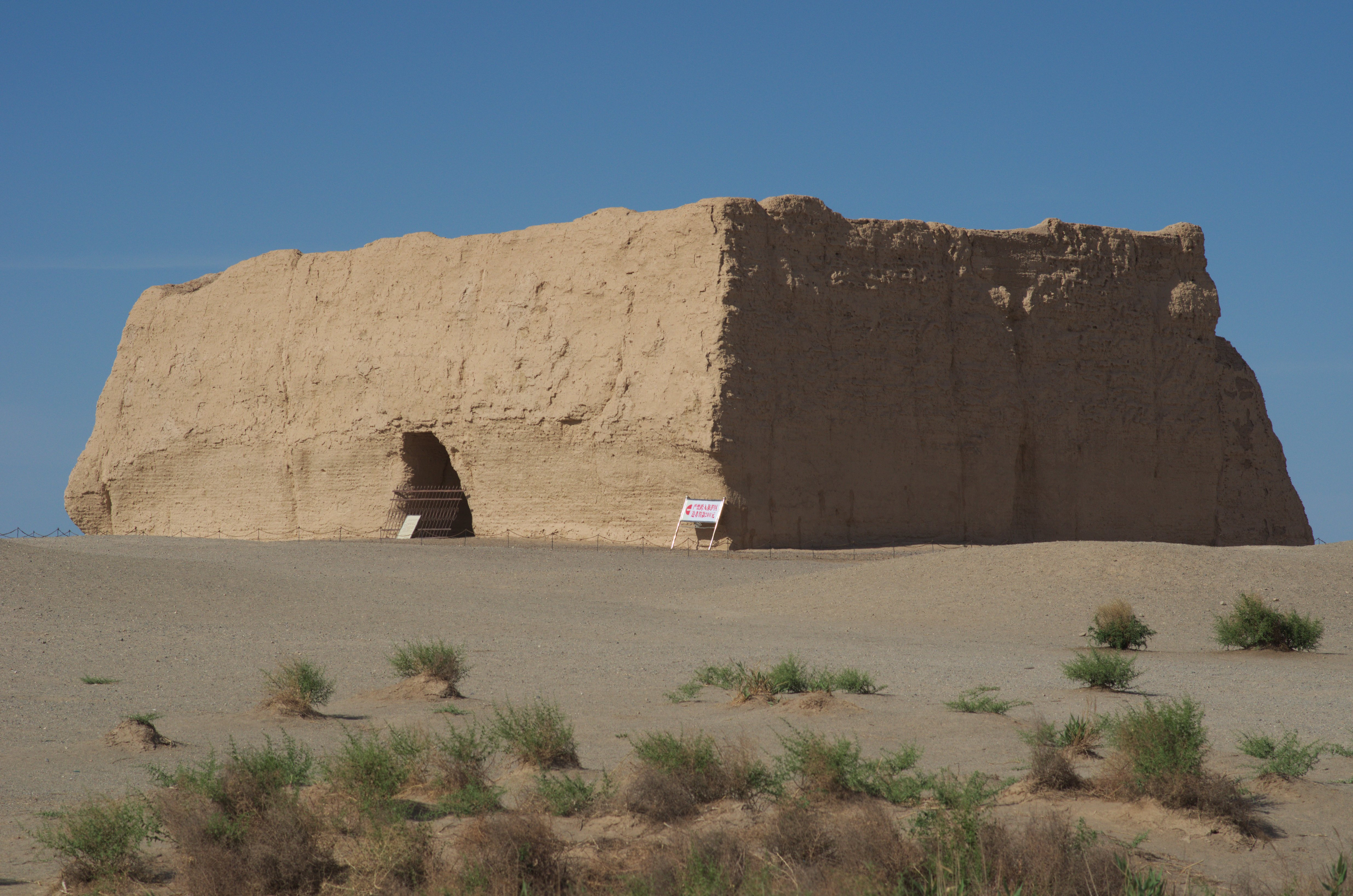 Dunhuang, Yumenguan